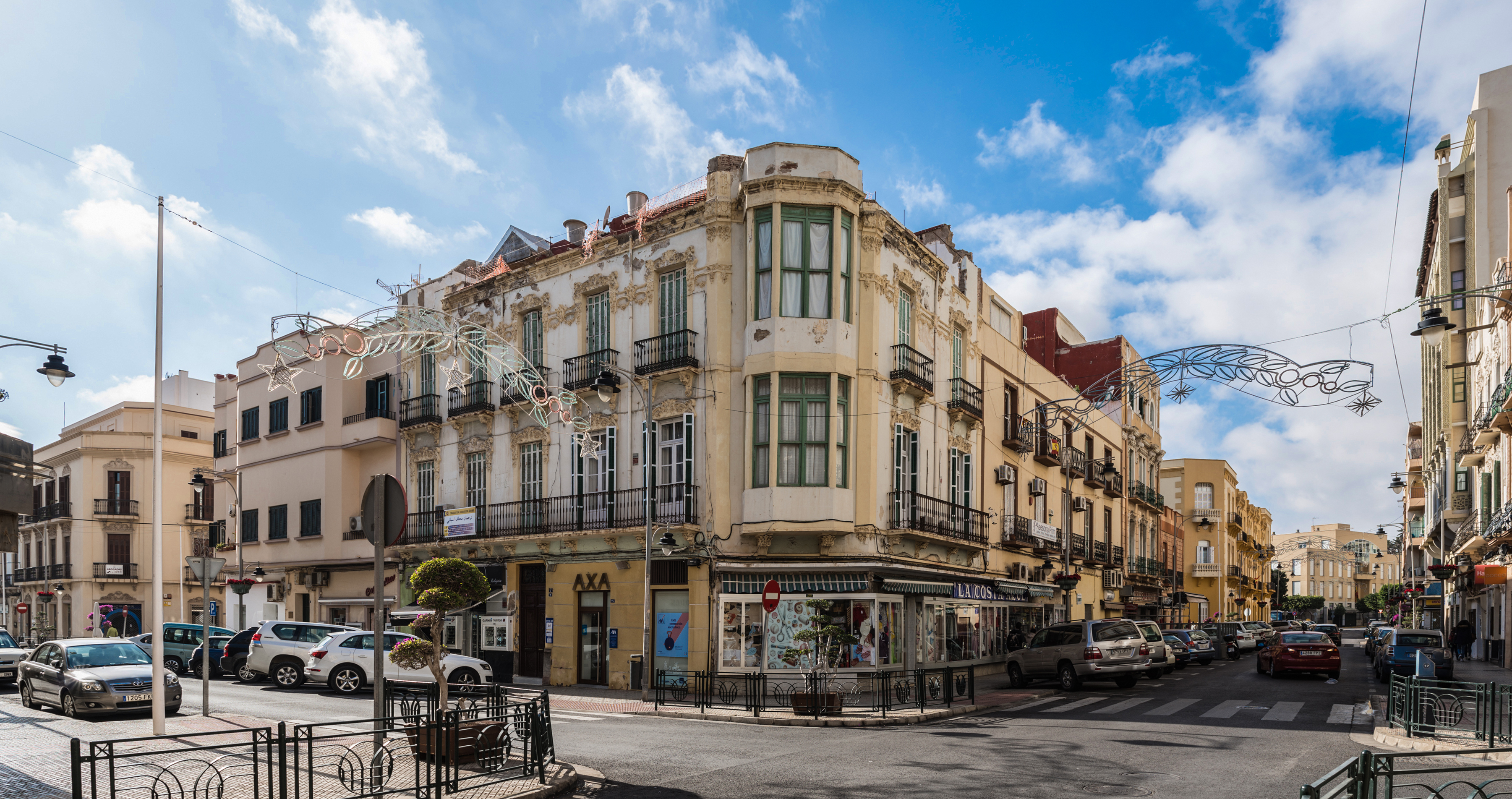 EDIFICIO ESTILO MODERNISTA EN CALLE GENERAL PAREJA, 7. ARQUITECTO EMILIO ALZUGARAY